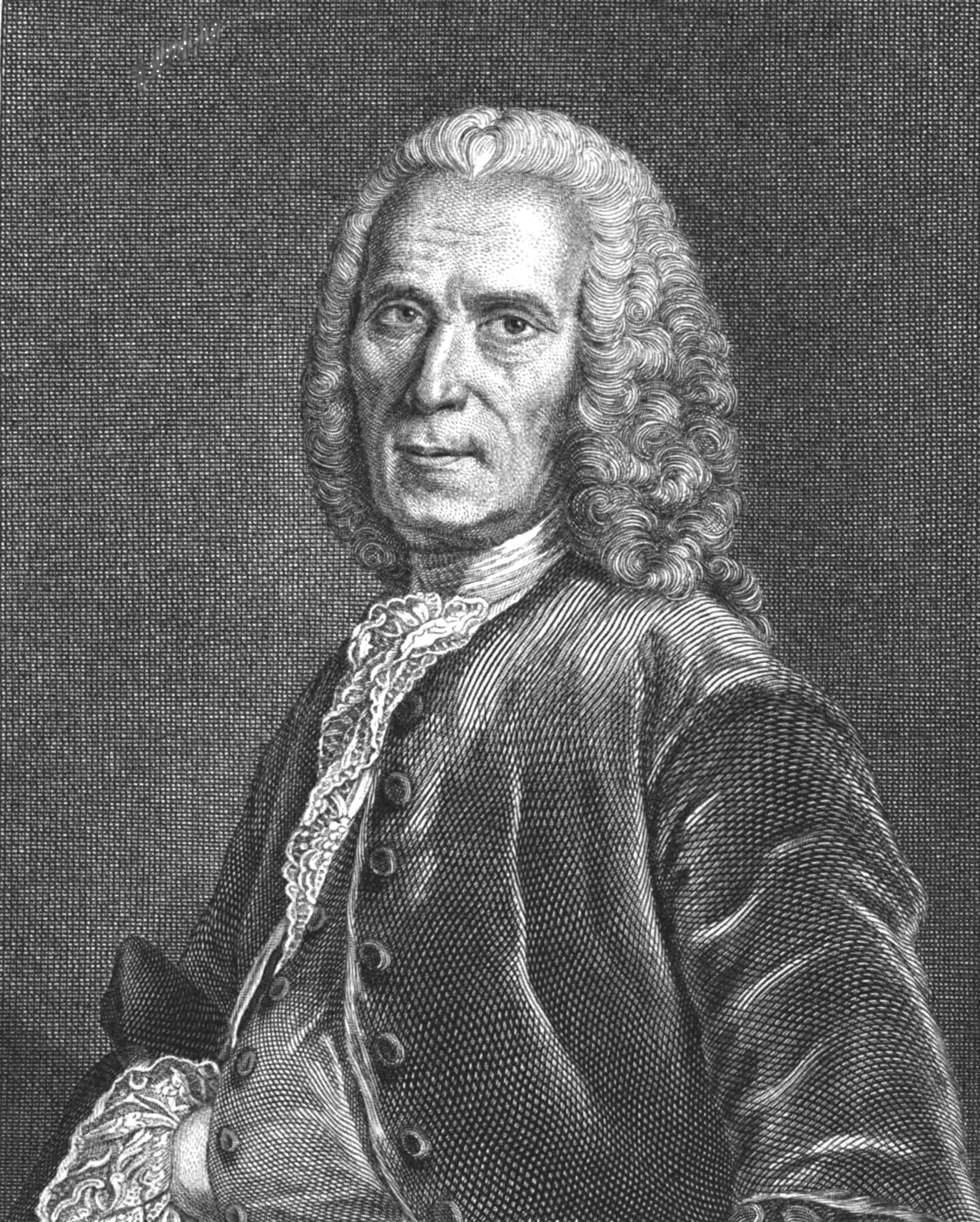 Jean Astruc. Autorenbild 1766